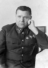 ЕРЁМЕНКО Андрей Иванович (1892 – 1970)